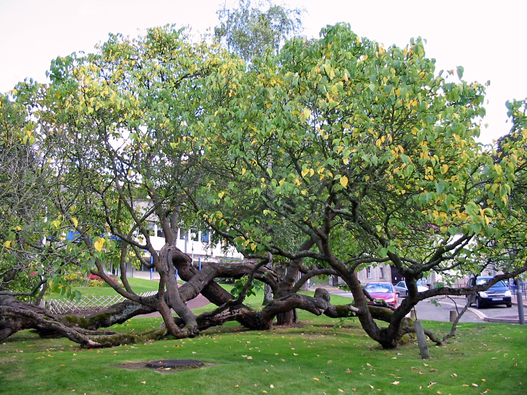 Mûrier remarquable (Morus nigra) devant la mairie d'Augergenville (Yvelines - France)